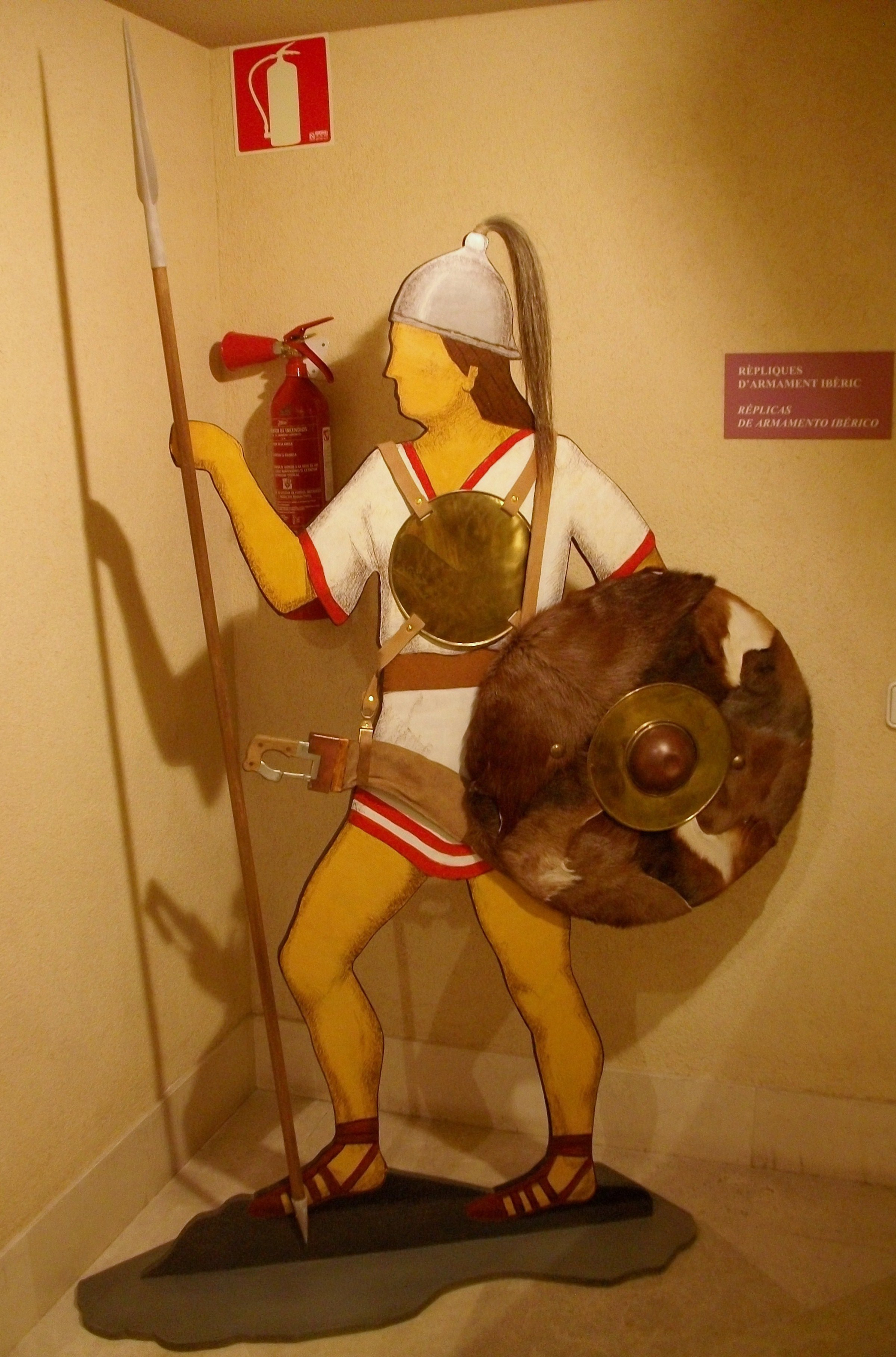 Rèpliques d'armament ibèric, Museu Arqueològic Municipal d'Alcoi.